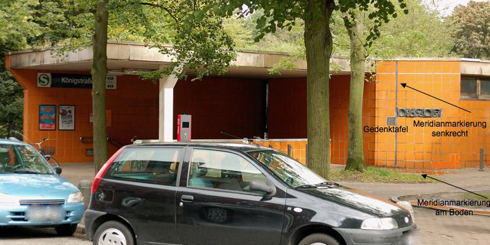 S-Bahnhaltestelle "Königstraße"/Hamburg, Ausgang Streuenseestraße, Altonaer Meridian